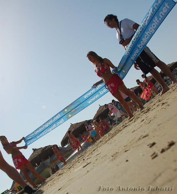 Frascia di protezione che viene utilizzata durante l'evento Beach Golf